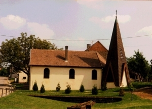 Olsberg